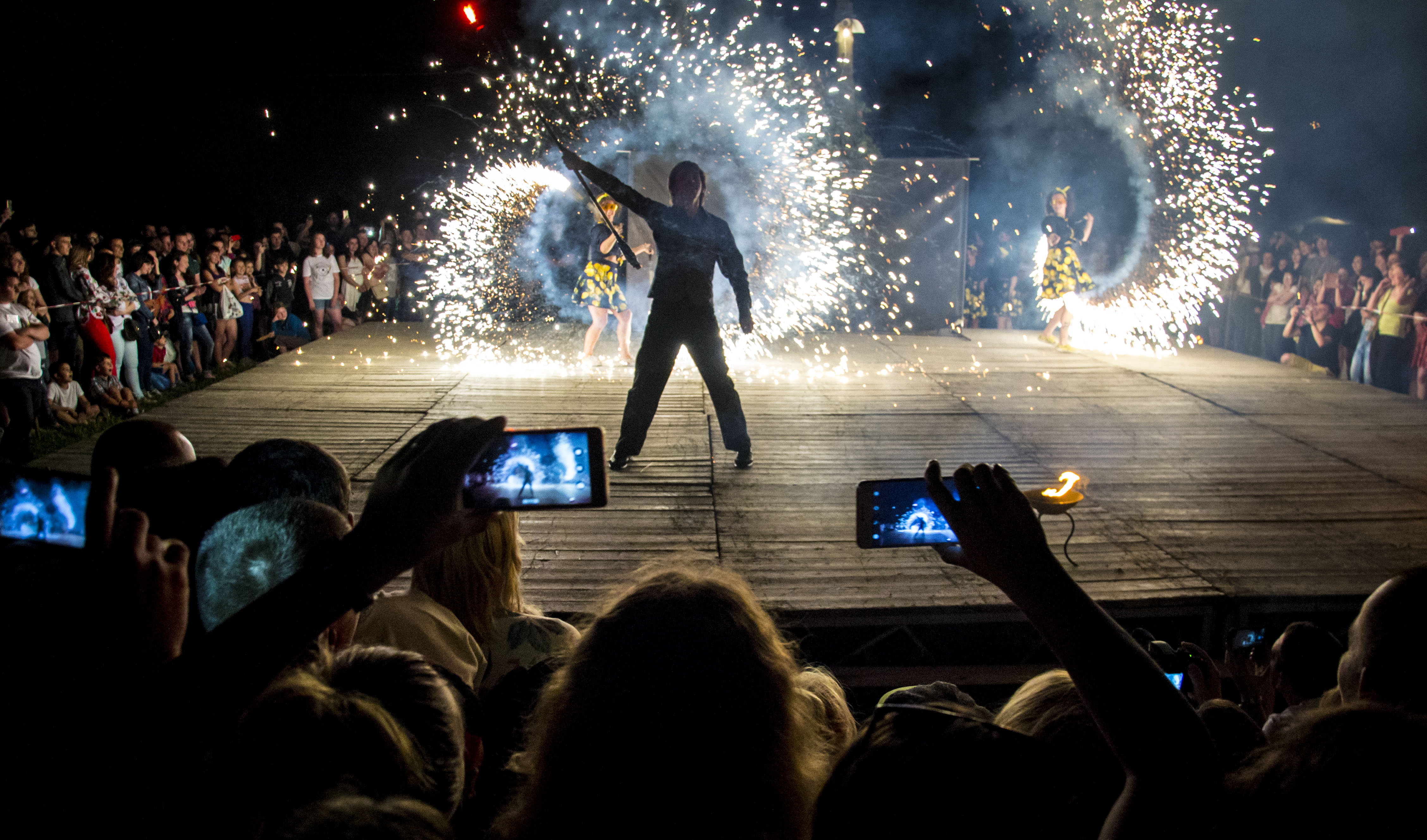 виступ формації "Тіні Вогню"